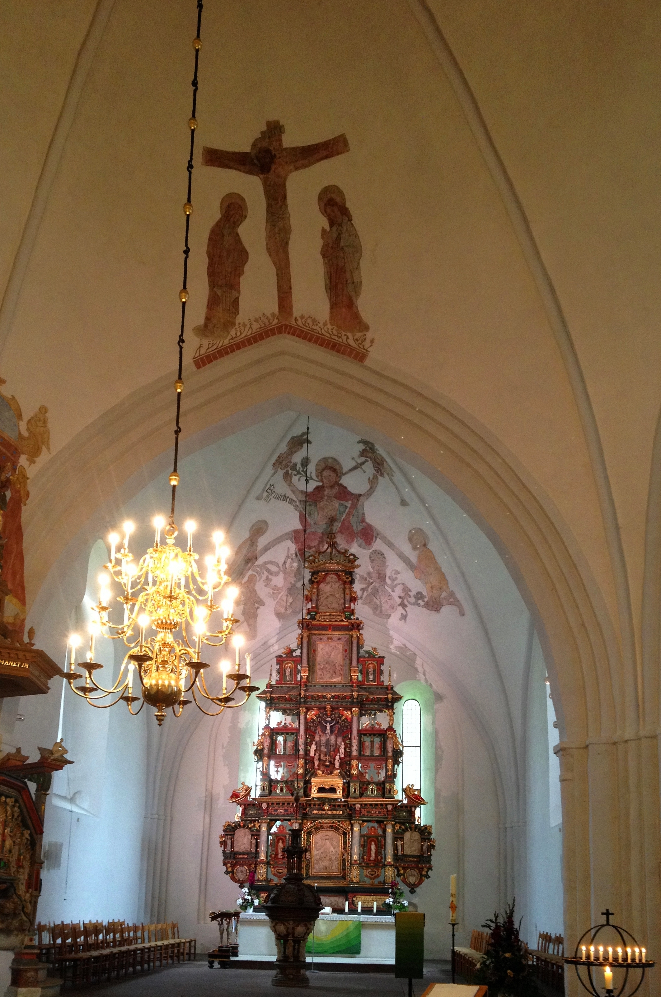 Varel, Schlosskirche, Inneres